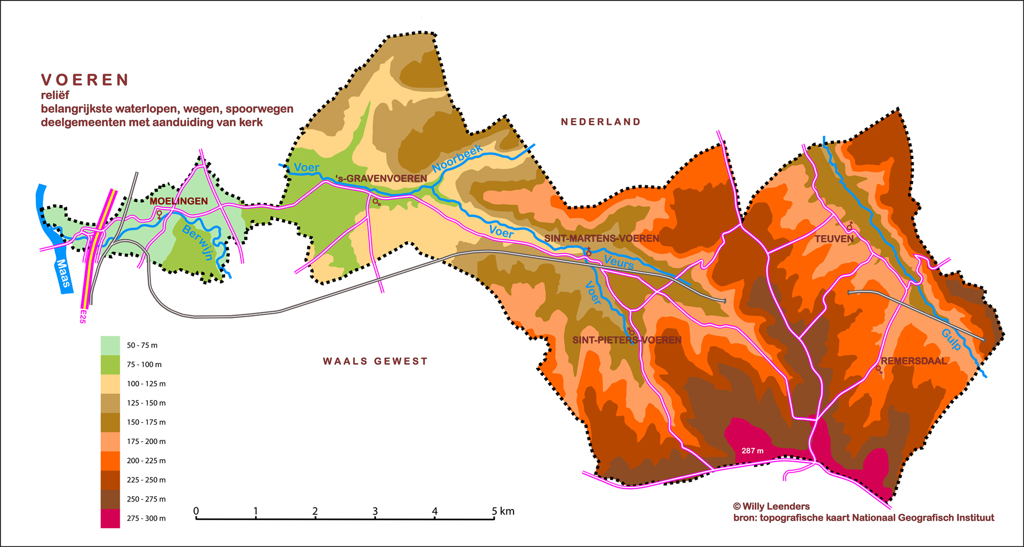 Kaart van Voeren met ingekleurd reliëf, watermopen, wegen, namen van deelgemeenten